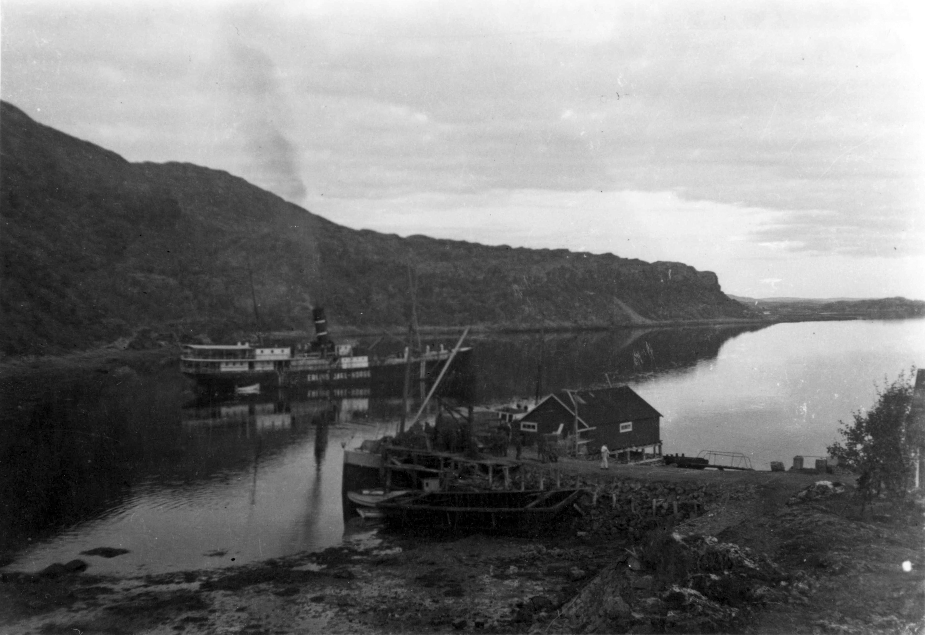 Hurtigruten D/S Erling Jarl, Hemnesberget september 1940 Tittel / Title: Hurtigruten D/S Erling Jarl, Hemnesberget Dato / Date: 03.09. 1940 Fotograf / Photographer: Rudi Margreiter Sted / Place: Hemnesberget, Nordland, Norge Eier / Owner Institution: Arkiv i Nordland Lenke / Link: Arkiv i Nordland Arkivreferanse /Archive reference: AIN.NA143.0191 Fra Dag Skogheims Privatarkiv Tekst bak på bildet: Ein schiff vor Hemnesberget R.M. Am 03.09.1940 bei der ausfahrt